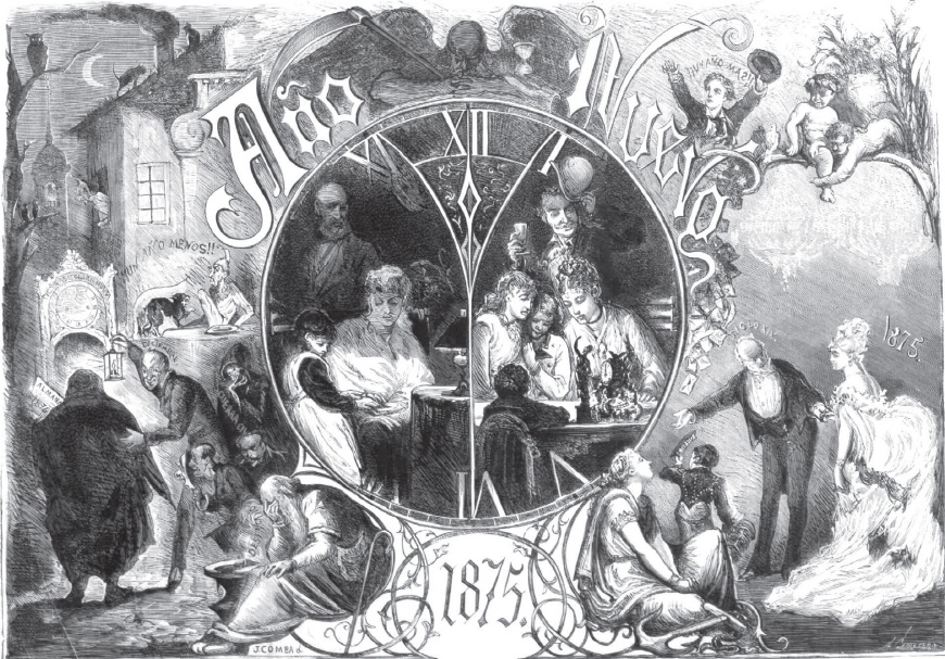 Alegoría del Año Nuevo. Composición y dibujo de J. Comba.